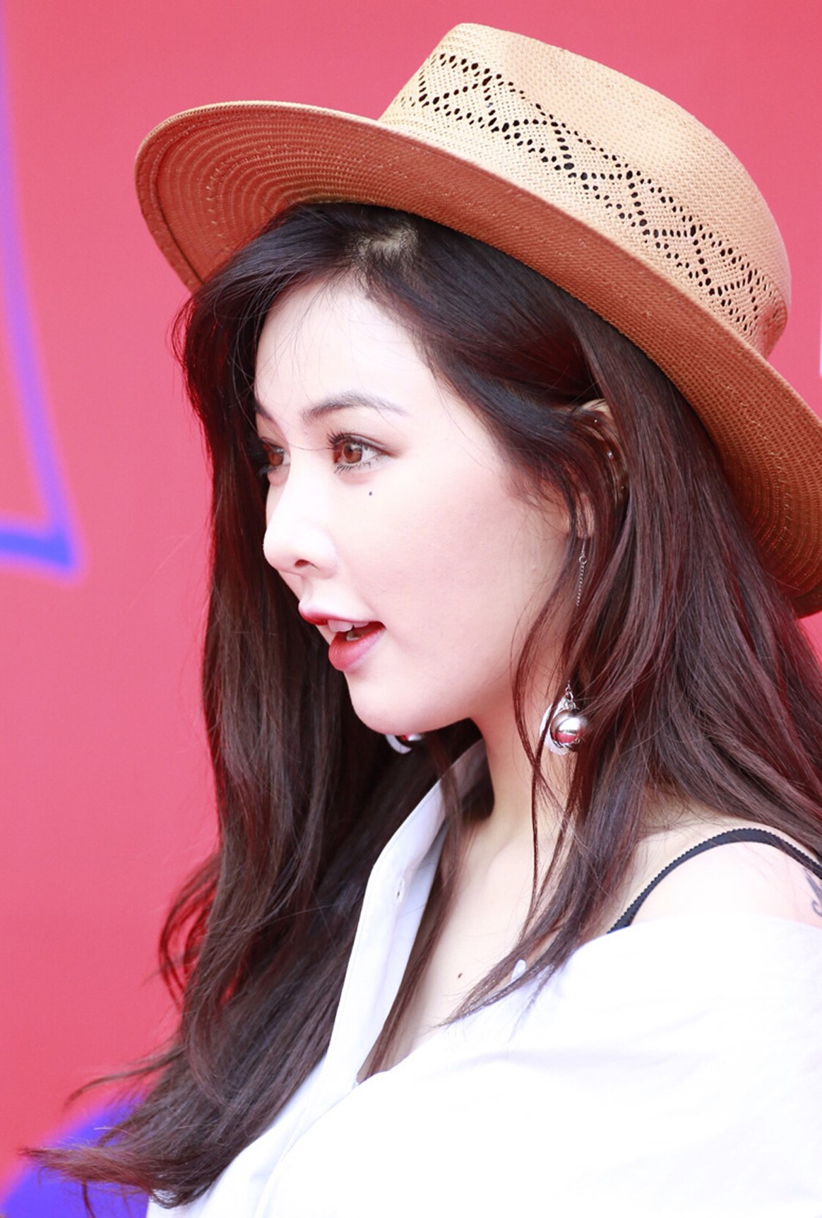 HyunA at the Seoul Fashion Week on March 24, 2016.